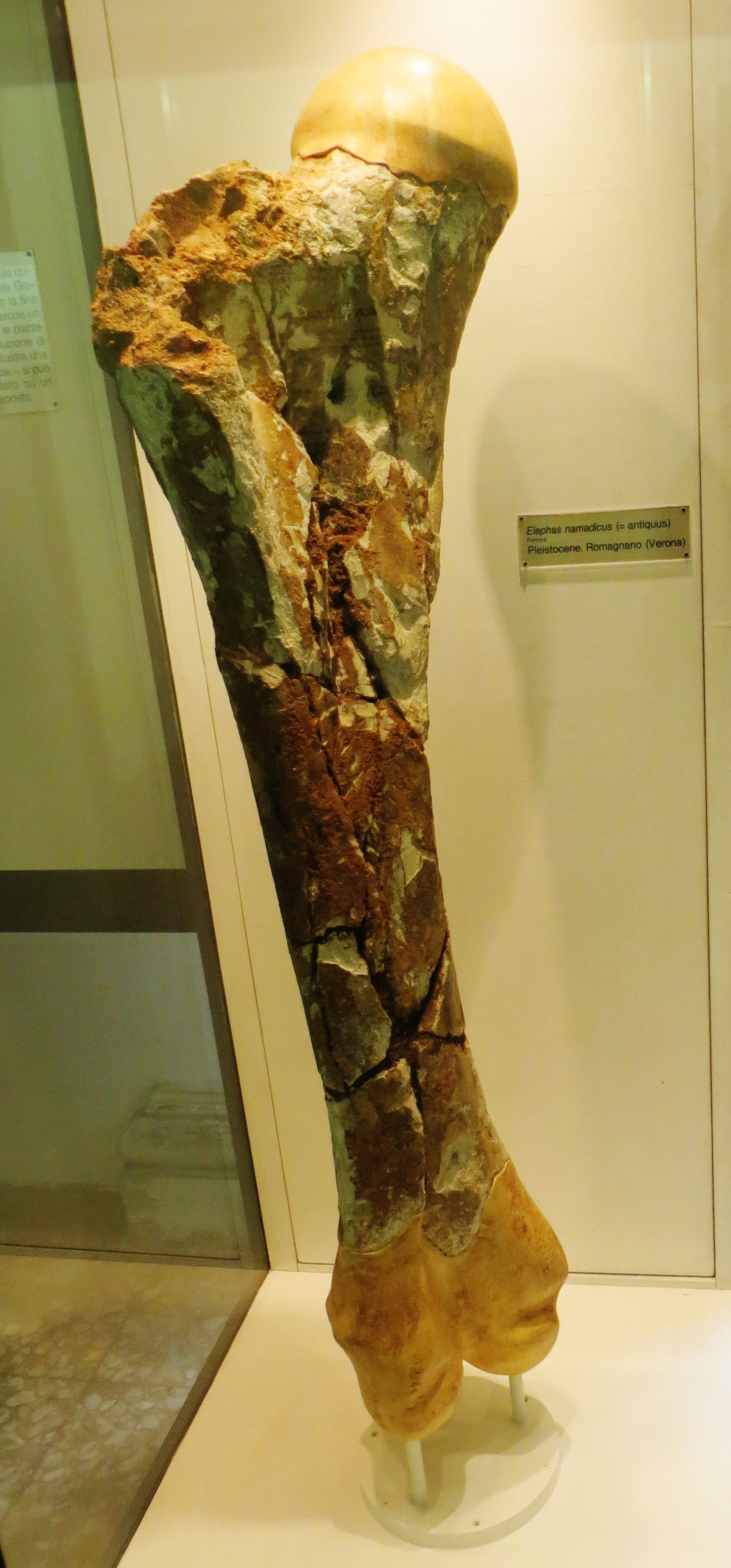 Fossil of Elephas namadicus, an extinct elephant- Took the photo at Museo di Storia Naturale di Verona